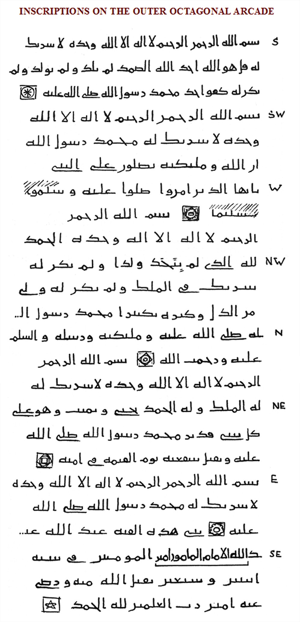 Inschrift am Felsendom, Jerusalem aus 691